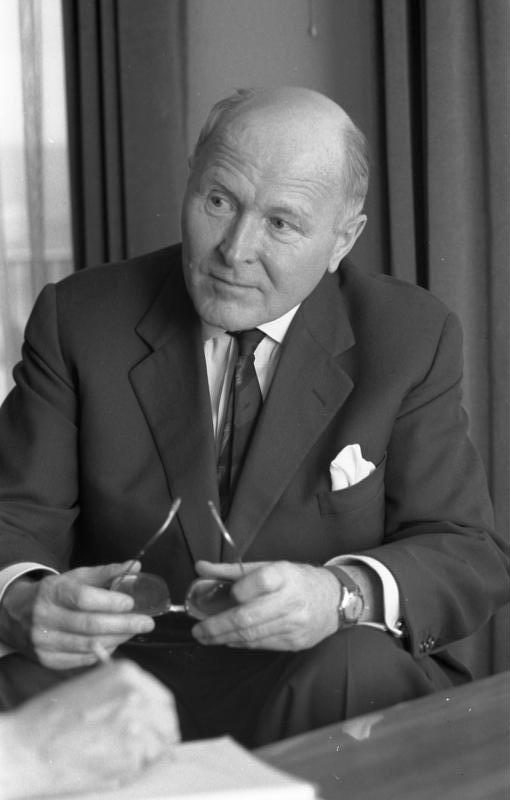 Sts. Dr. Cartellieri (BMwF) erhält das Buch "Ranger 7 zum Mond" durch den Attaché der amerikanischen Botschaft, Dr. W. Williams